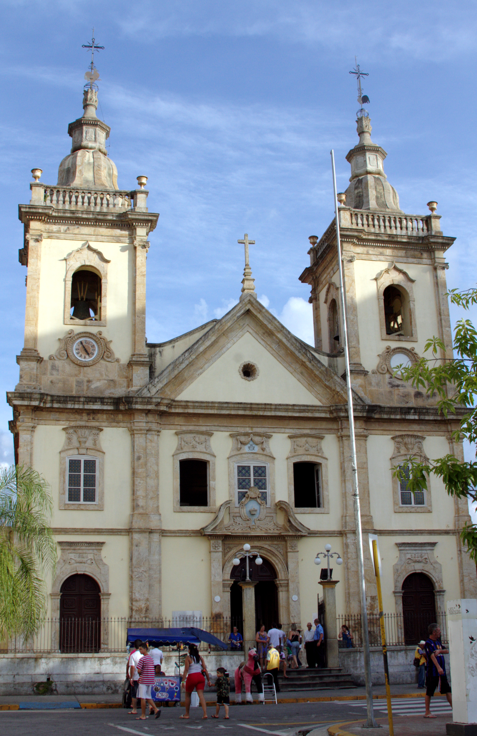 Basílica Velha de Aparecida